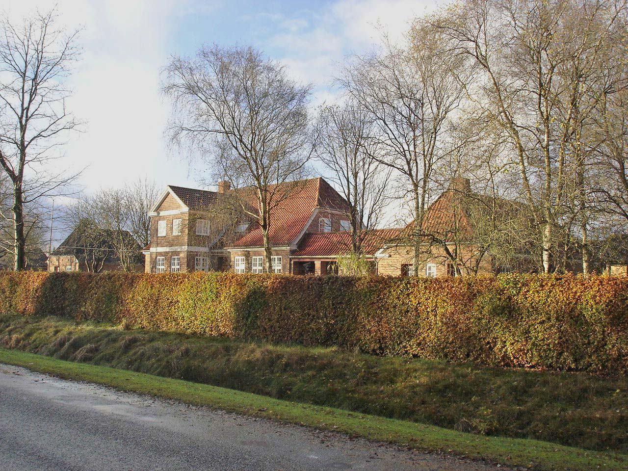 Videbæk Station, sporsiden fra Ø